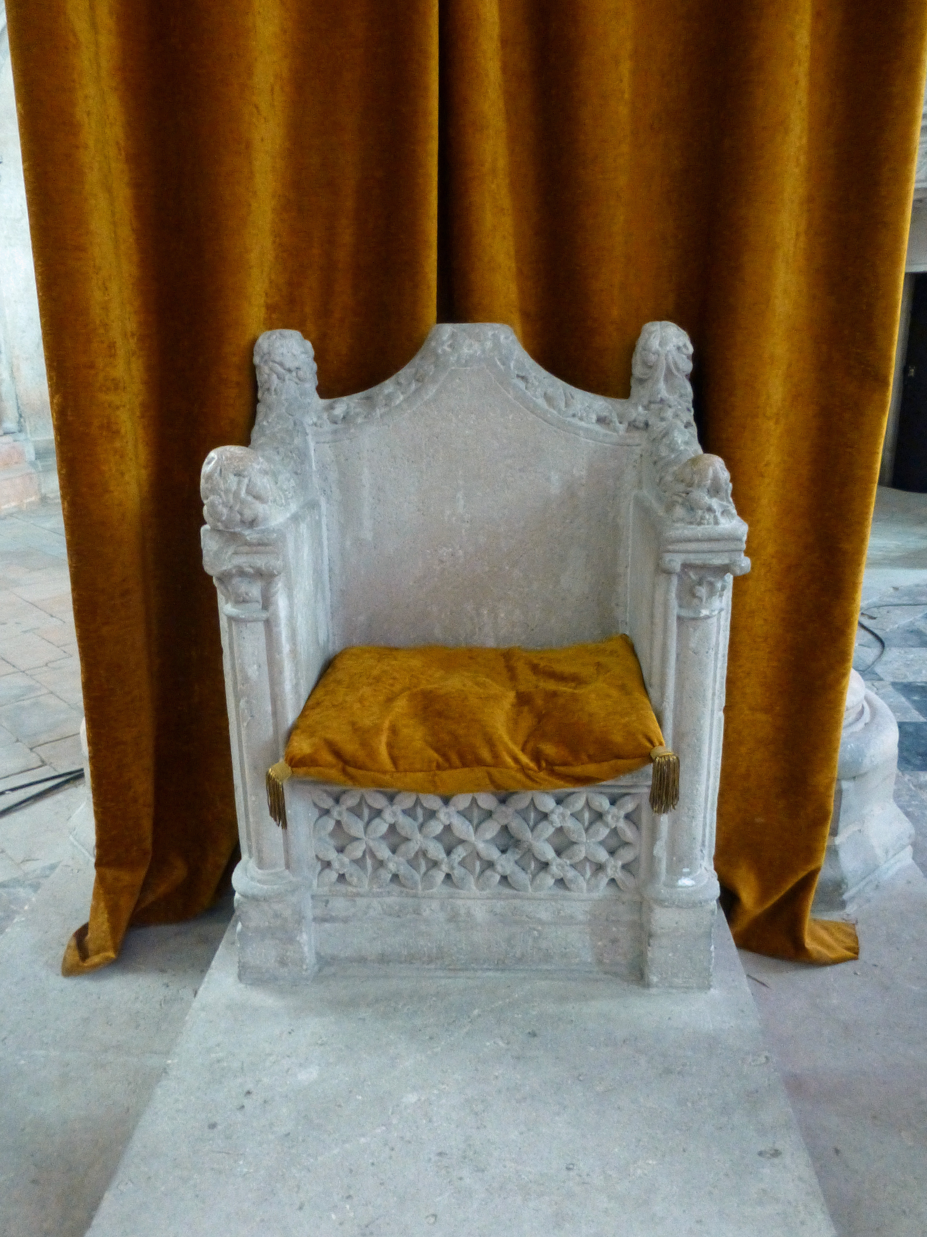 Cathédrale Saint-Etienne de Toul (Meurthe-et-Moselle) : cathèdre de saint Gérard